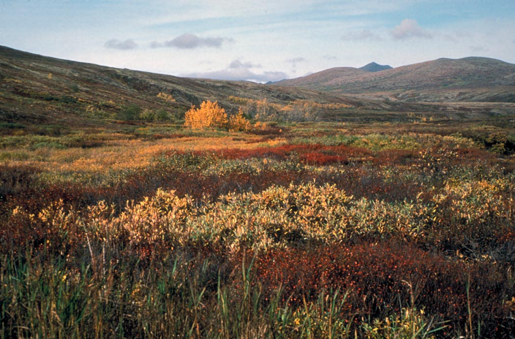 Tundra, Yukon Delta National Wildlife Refuge